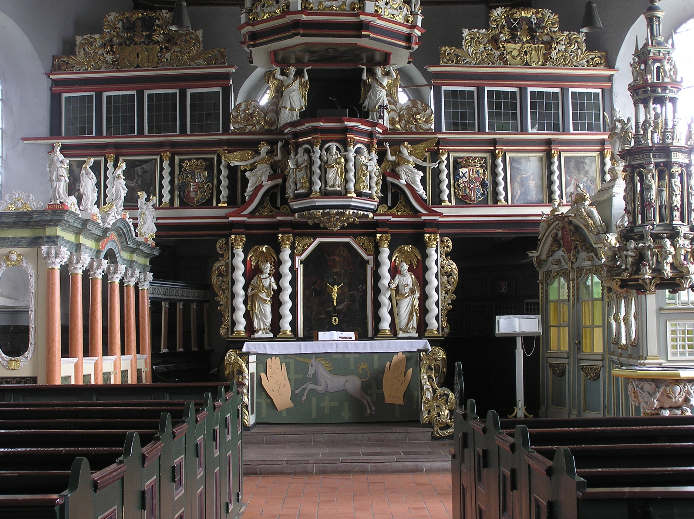 St. Pankratius, Neuenfelde